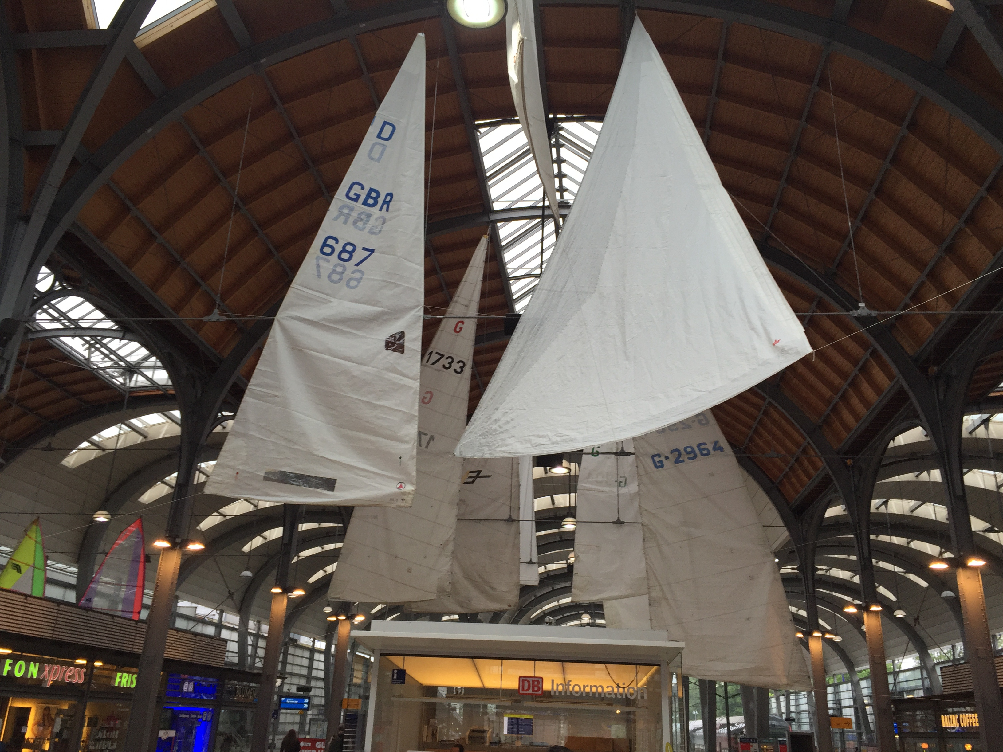 Halle Kieler Hauptbahnhof Kieler Woche